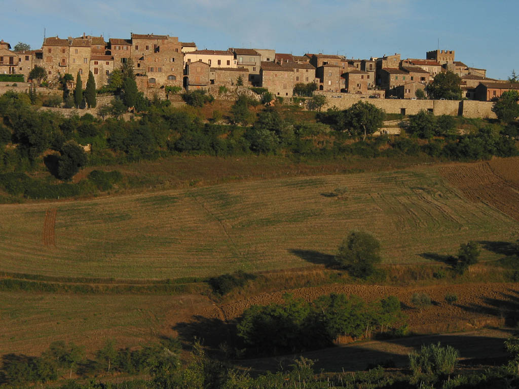 Casole d'Elsa, view